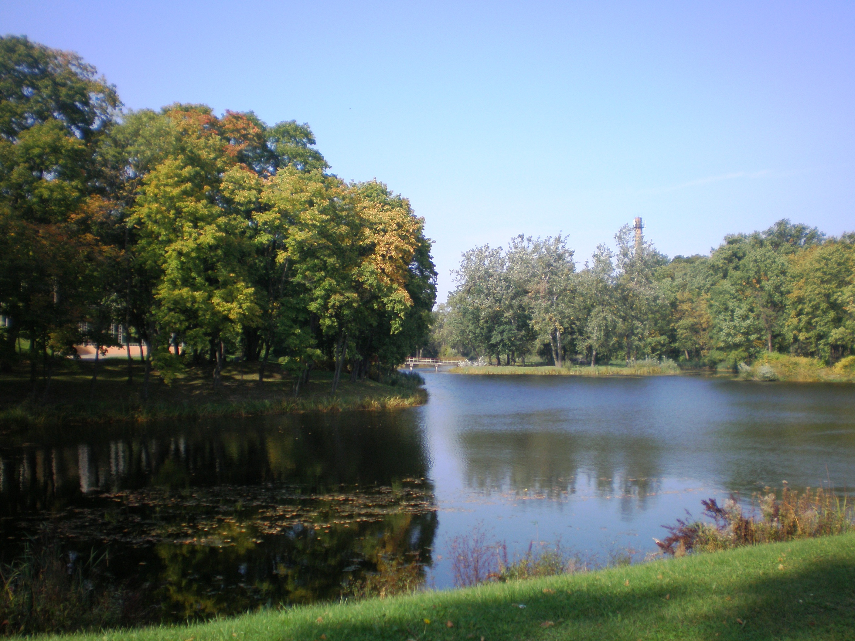 Žemaitėška: Dotnovielės tvenkėnīs Kiedainiūs